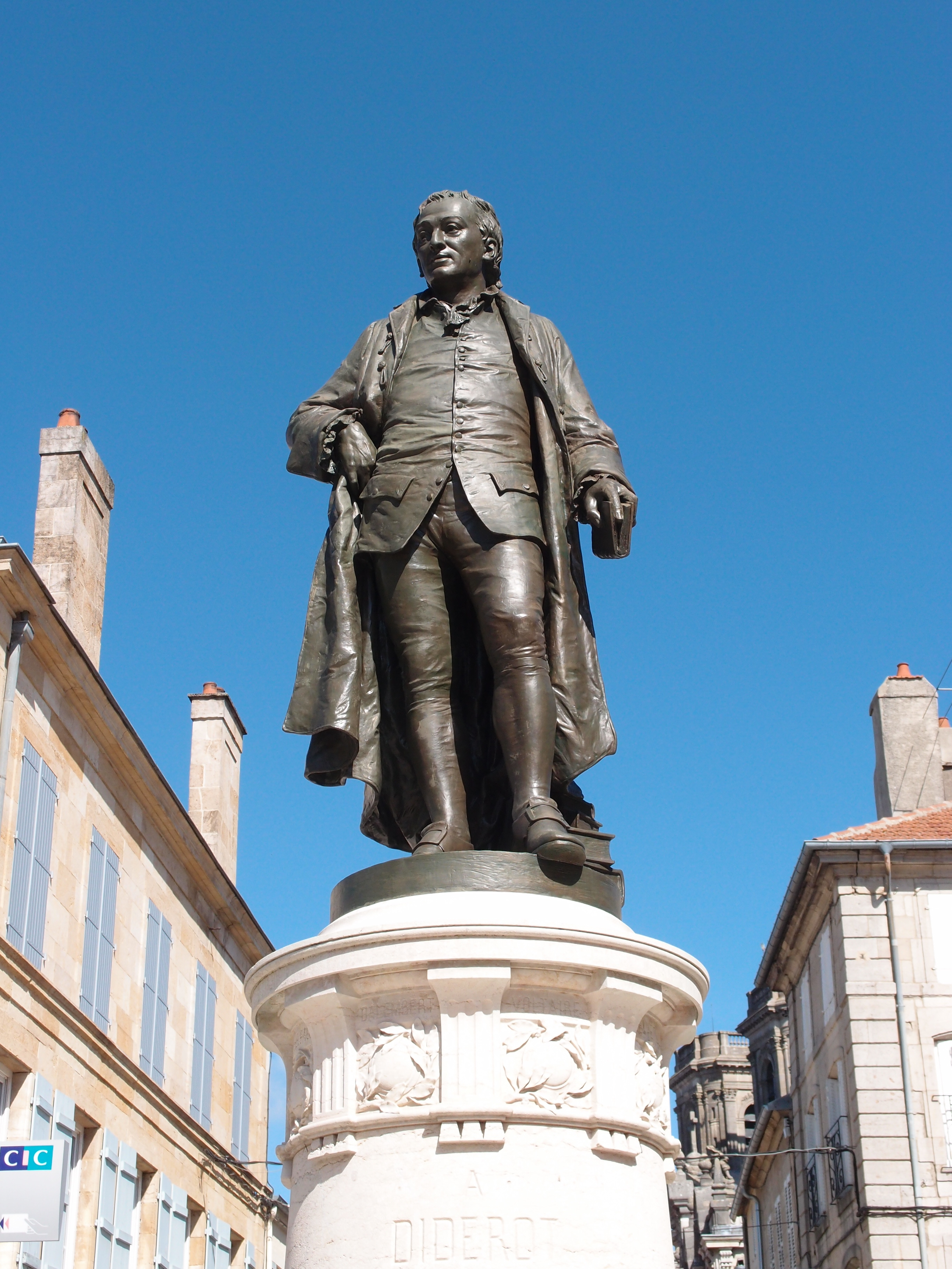 Detailansicht des Diderot-Denkmals in Langres (Frankreich) Urheber: M. Pfeiffer alias Benutzer:Gordito1869 Quelle: privates Fotoarchiv des Urhebers